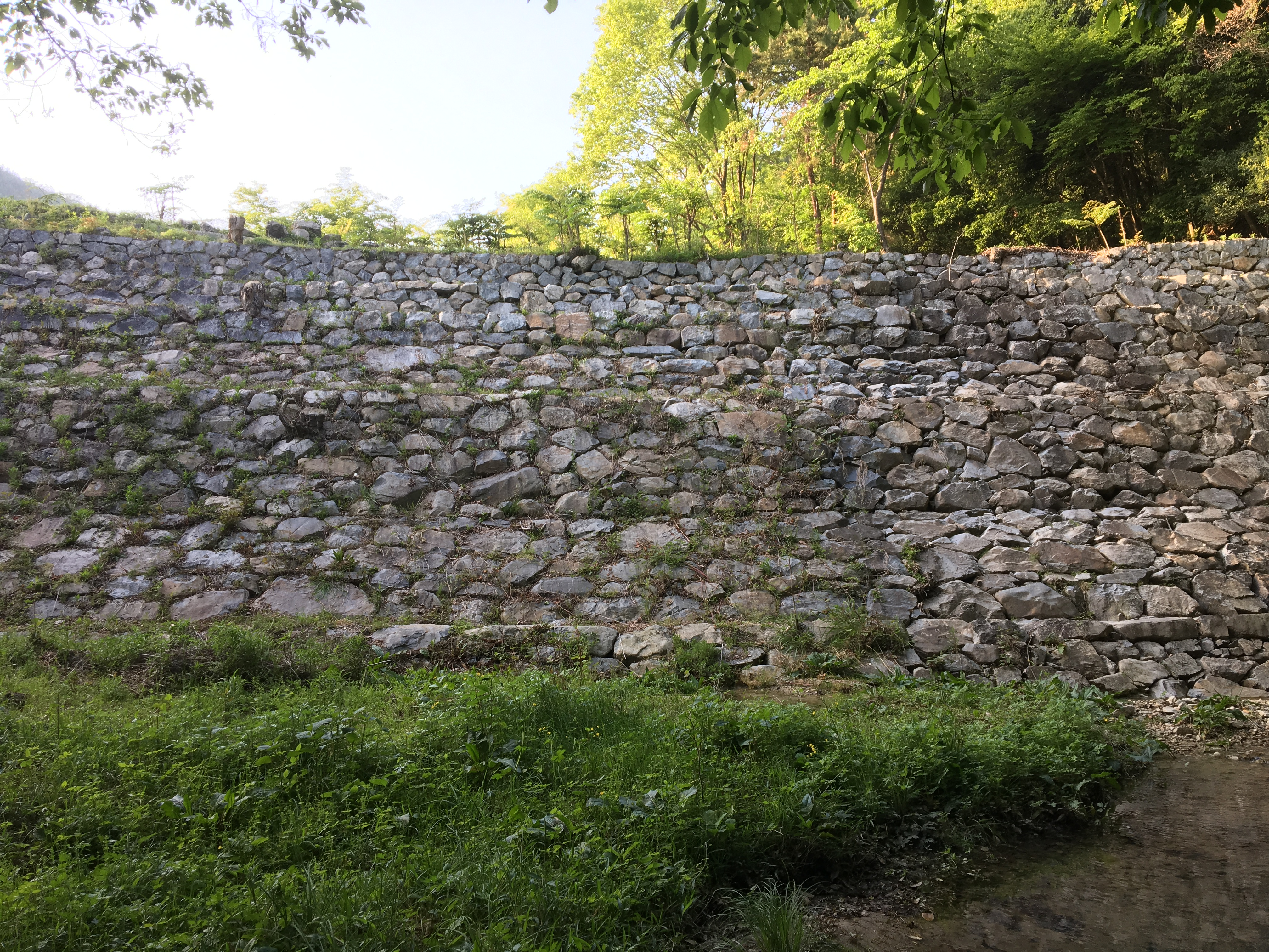 広島県福山市山手町の俄谷砂留群の第2番砂留